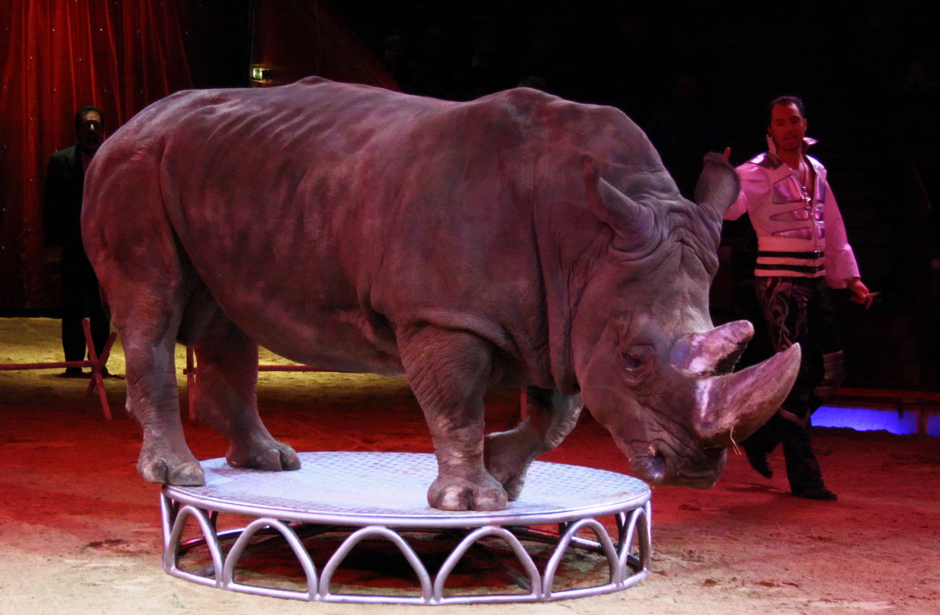 TSAVO, jahrzentelang mit Circus Barum auf Reisen , ist 3.5 Tonnen schwer, 32 Jahre jung und seit 30 Jahren ein Star der Manege. Hier bei einem Auftritt beim Circus Krone, wo TSAVO nun zu Hause ist. Tiertrainer ist Martin Lacey jr.